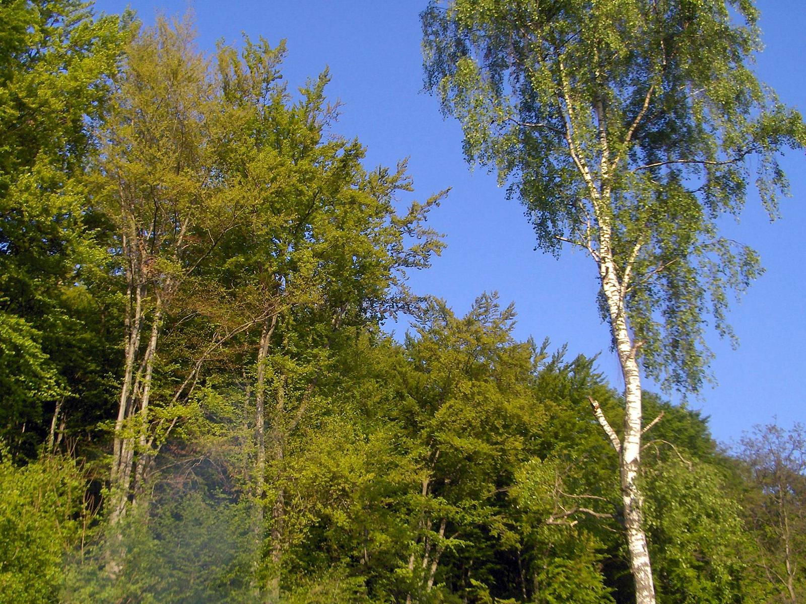 Grabownica Starzeńska - country in Podkarpacie Voivodship